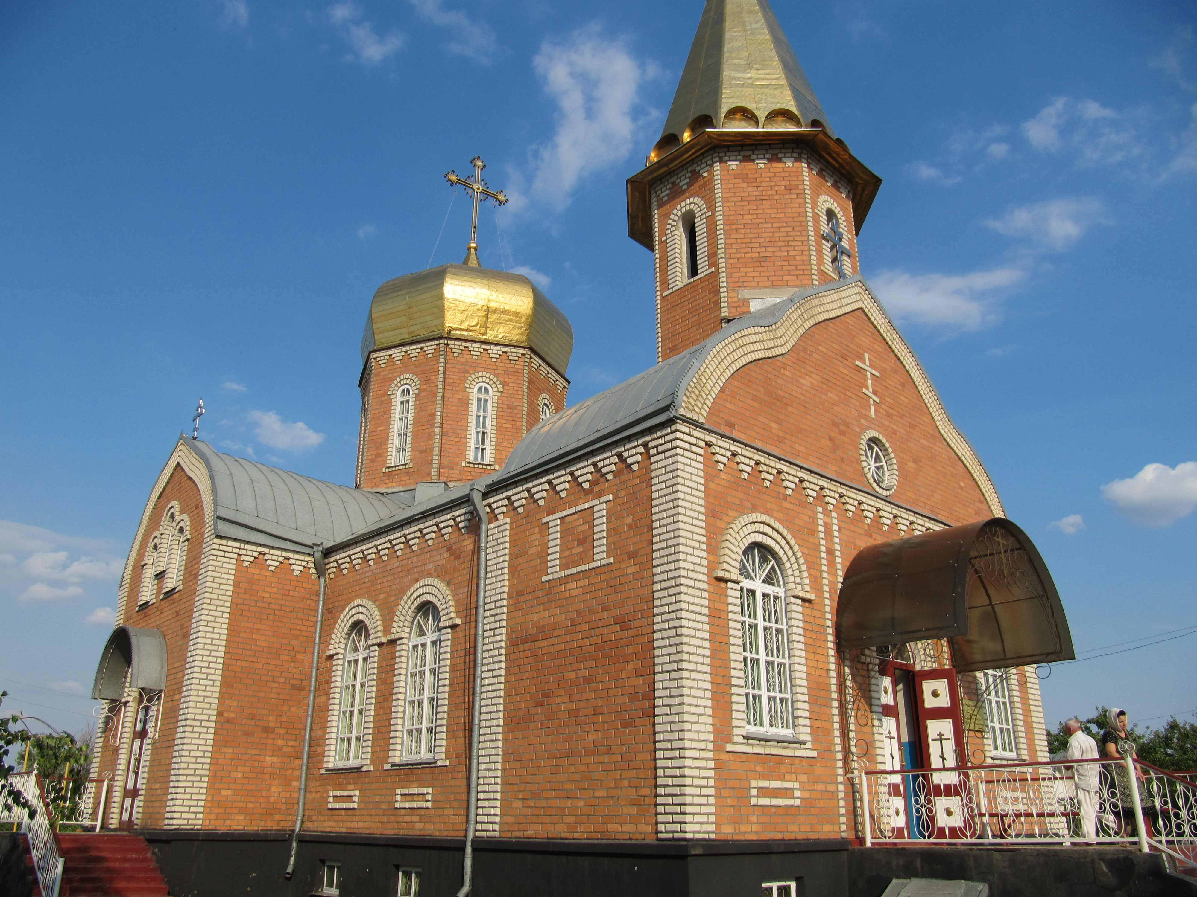 Крестовоздвиженский храм в селе Приютное, Калмыкия